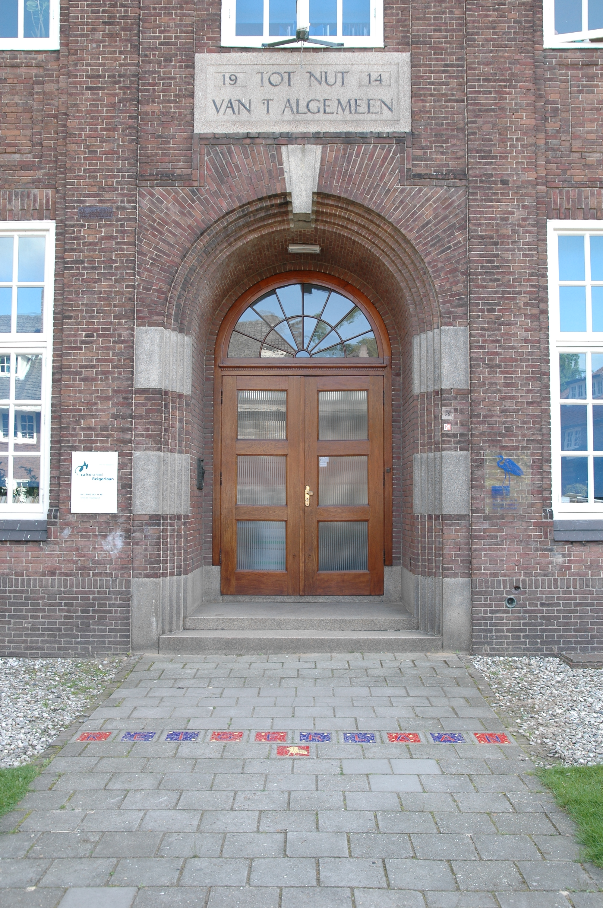 Basisschool Reigerlaan Eindhoven - ingang hoofdgebouw